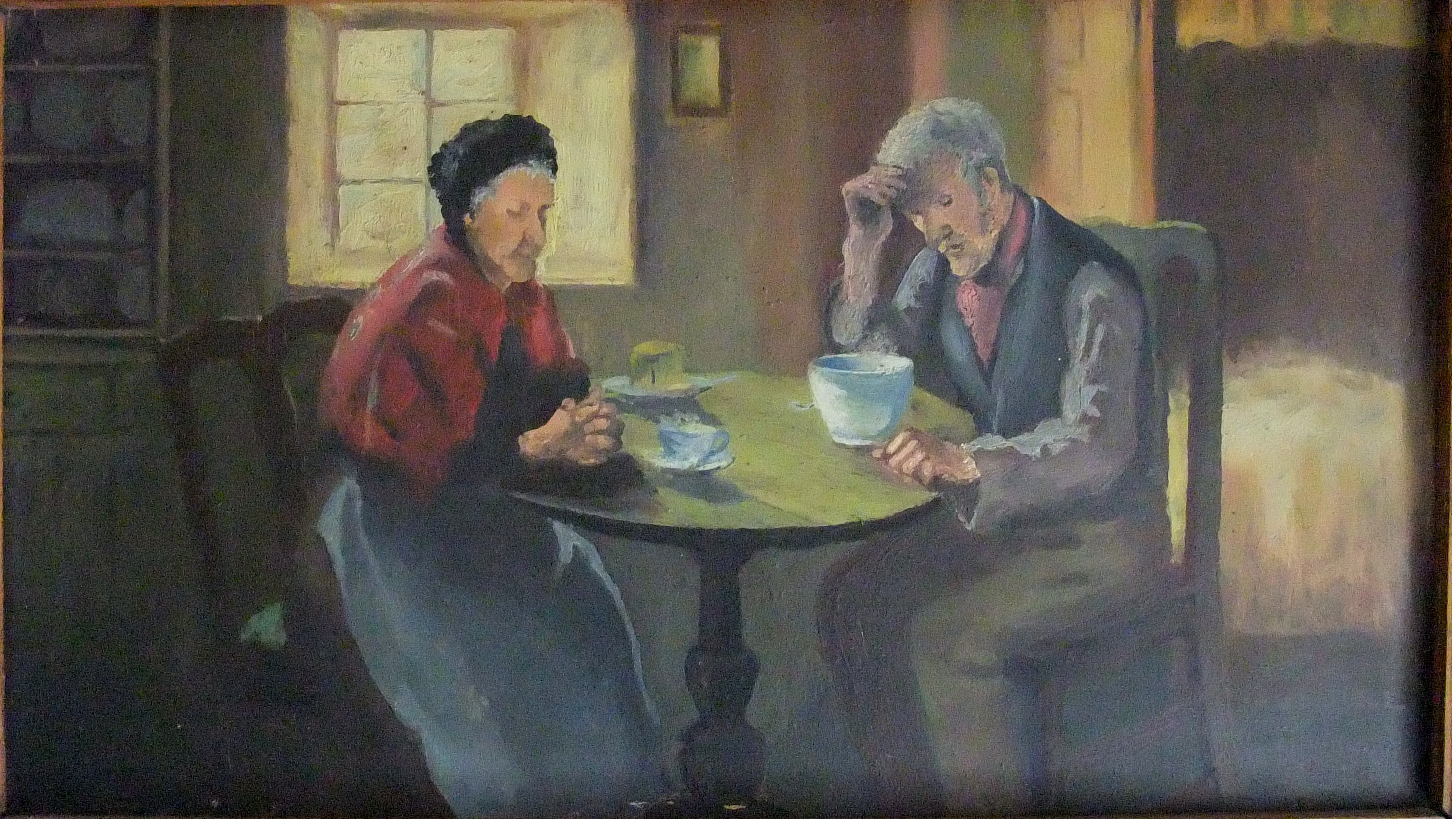 Tableau peint par Paul Rose représentant ses grands-parents maternels, Charles Decarne et Céline Leroy.